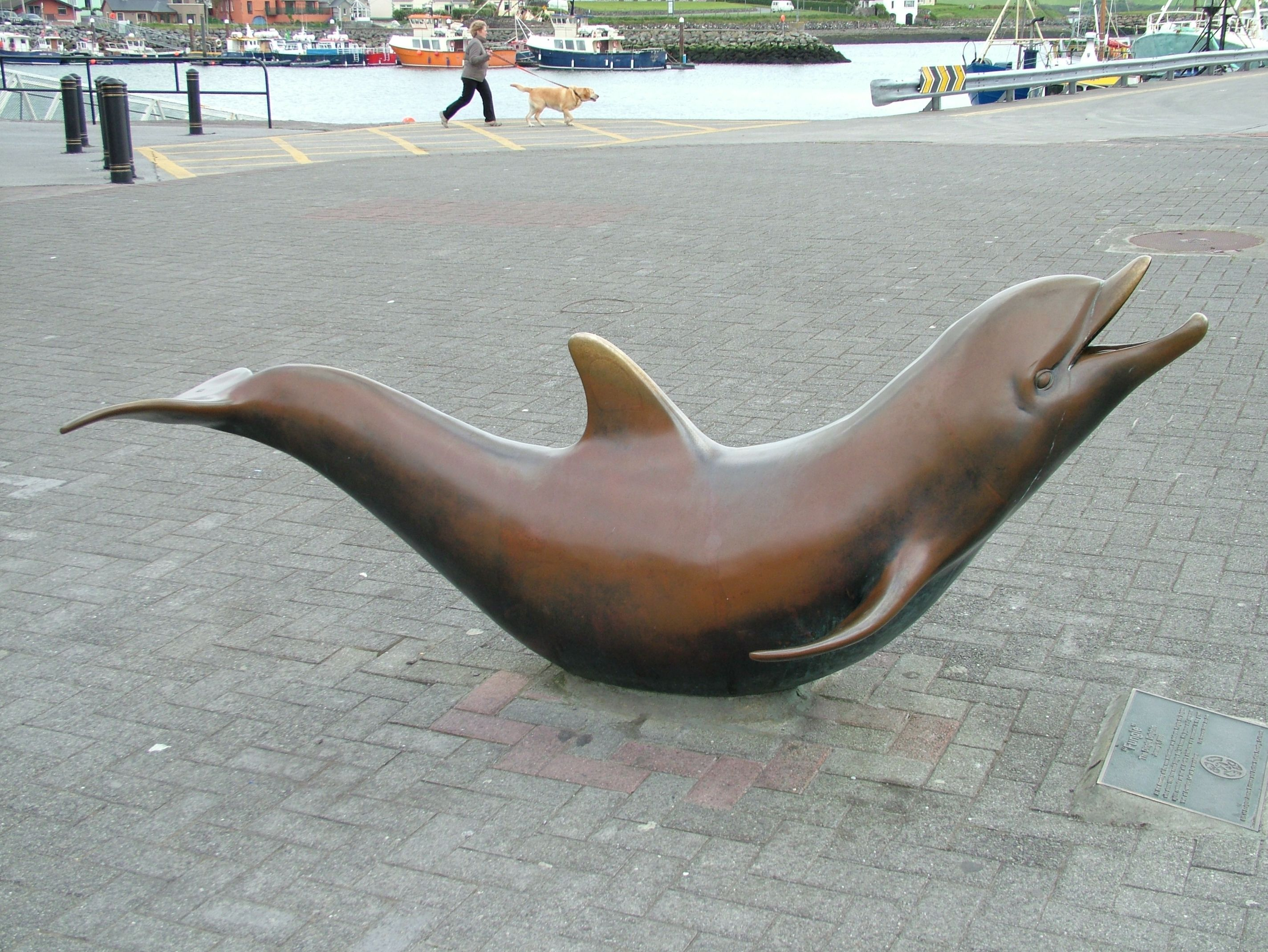 Dingle, Irland, der Delphin Fungie